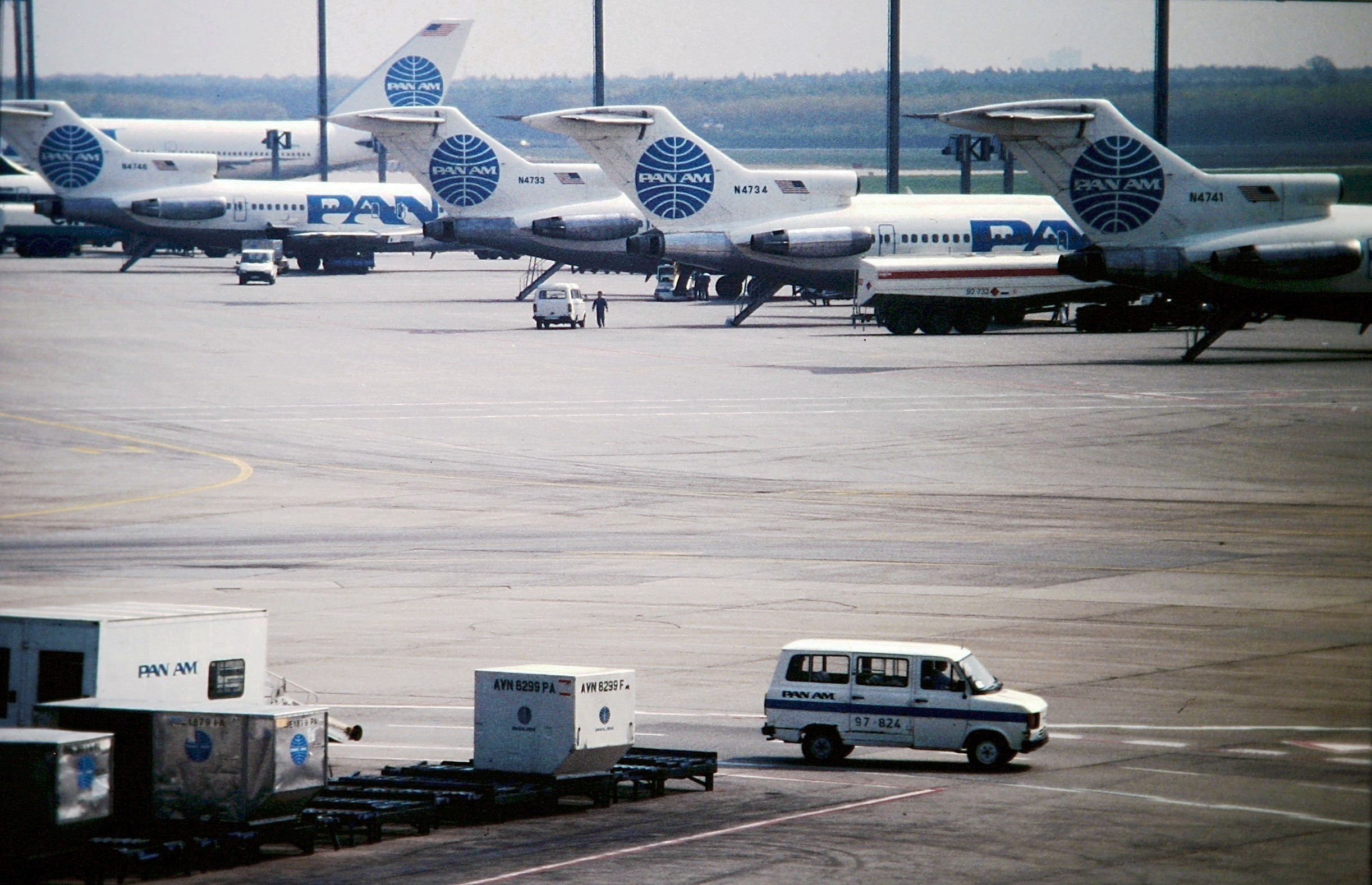 Rush Hour der PanAm auf dem Tarmac von Frankfurt/Main Flughafen (Mitte der 1980er Jahre)